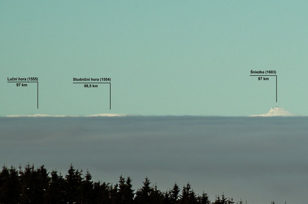 Karkonosze z schroniska "Pod Śnieżnikiem" w czasie miażu inwerysjnego